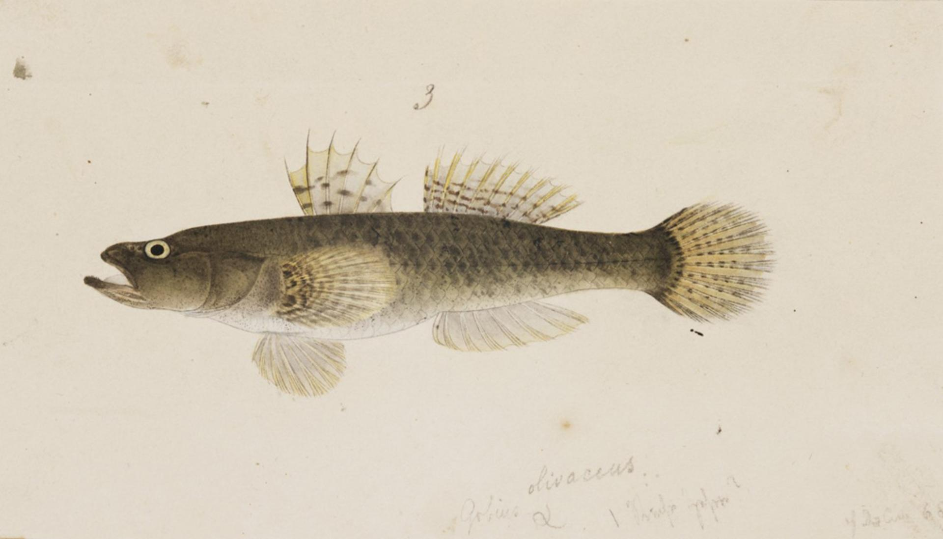 Glossogobius olivaceus (Temminck and Schlegel)